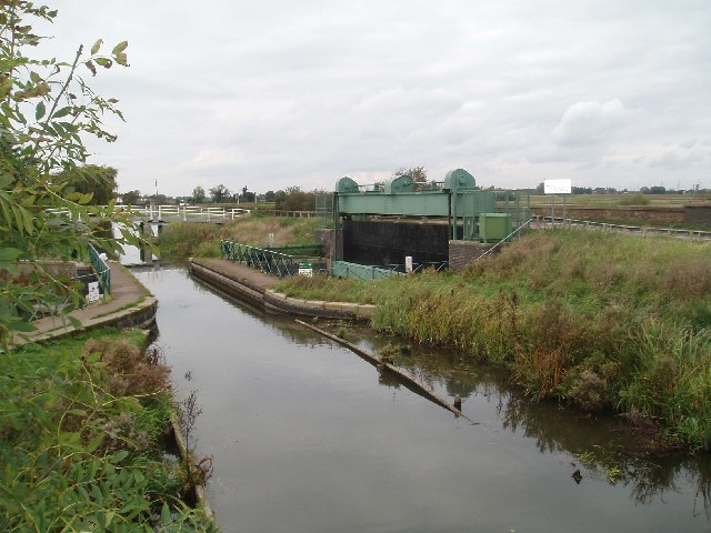 Mullicourt Aqueduct